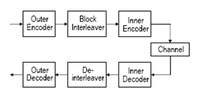 Diagrama de blocs d'un Sistema de Transmissió